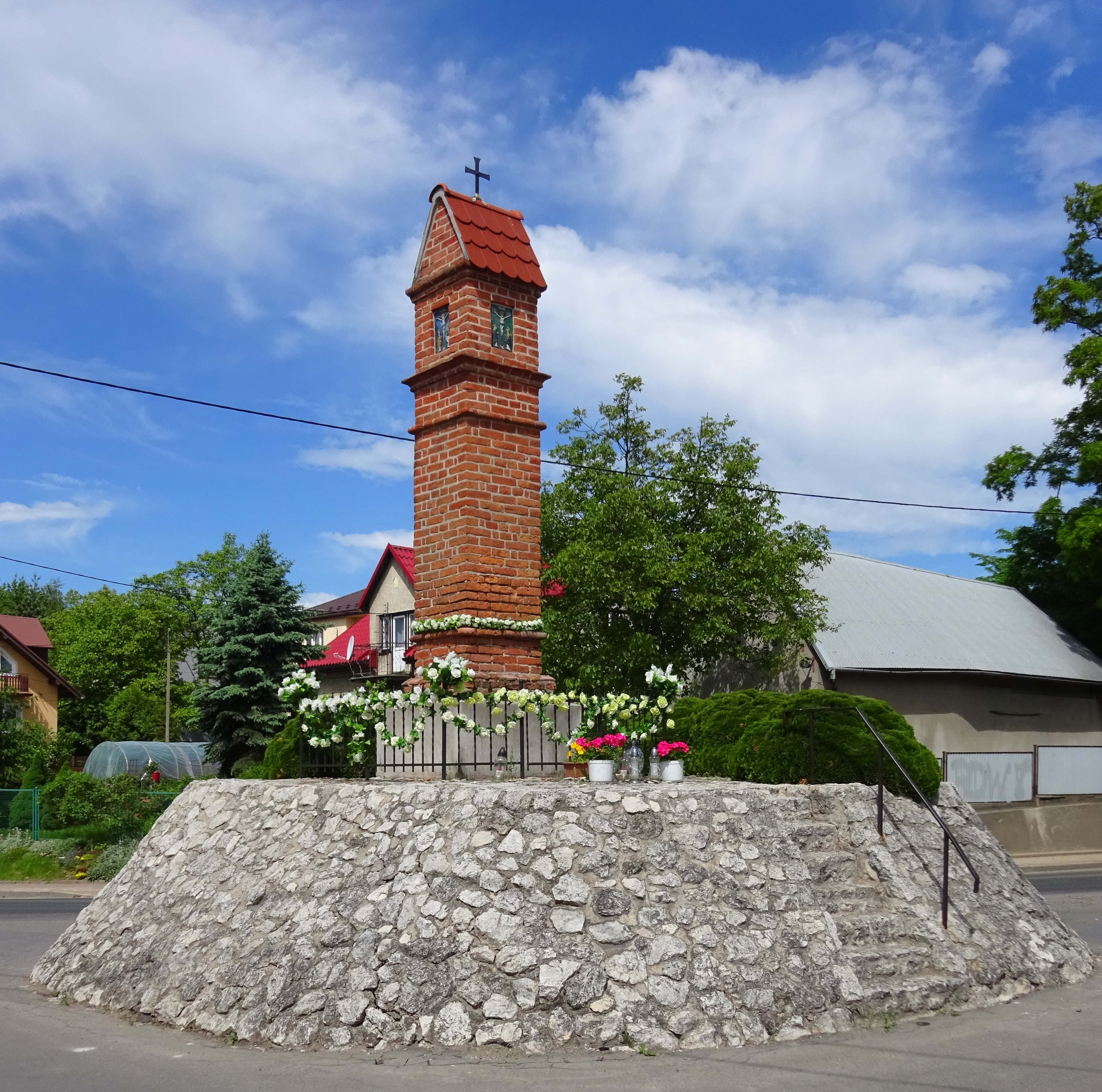 Ceglana kapliczka słupkowa w Batowicach koło Krakowa, w centrum miejscowości z XVII wieku. 2017